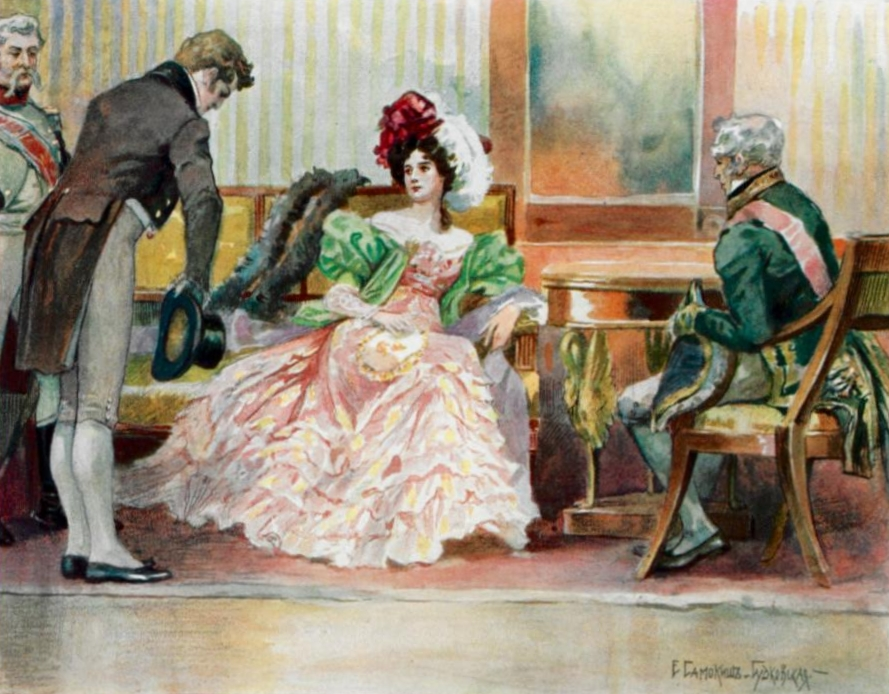 Набор открыток "Евгений Онегин"